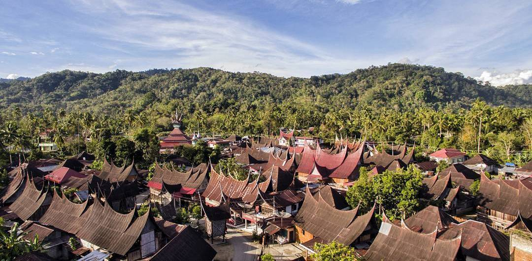 Kawasan Seribu Rumah Gadang